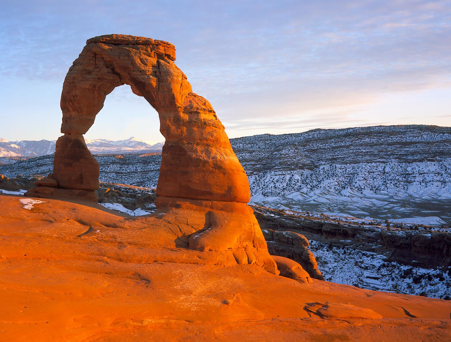 Via